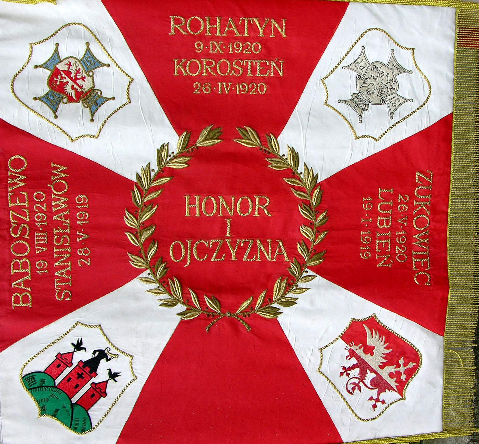 Replika sztandaru 37 Pułku Piechoty z Muzeum Bitwy nad Bzurą w Kutnie